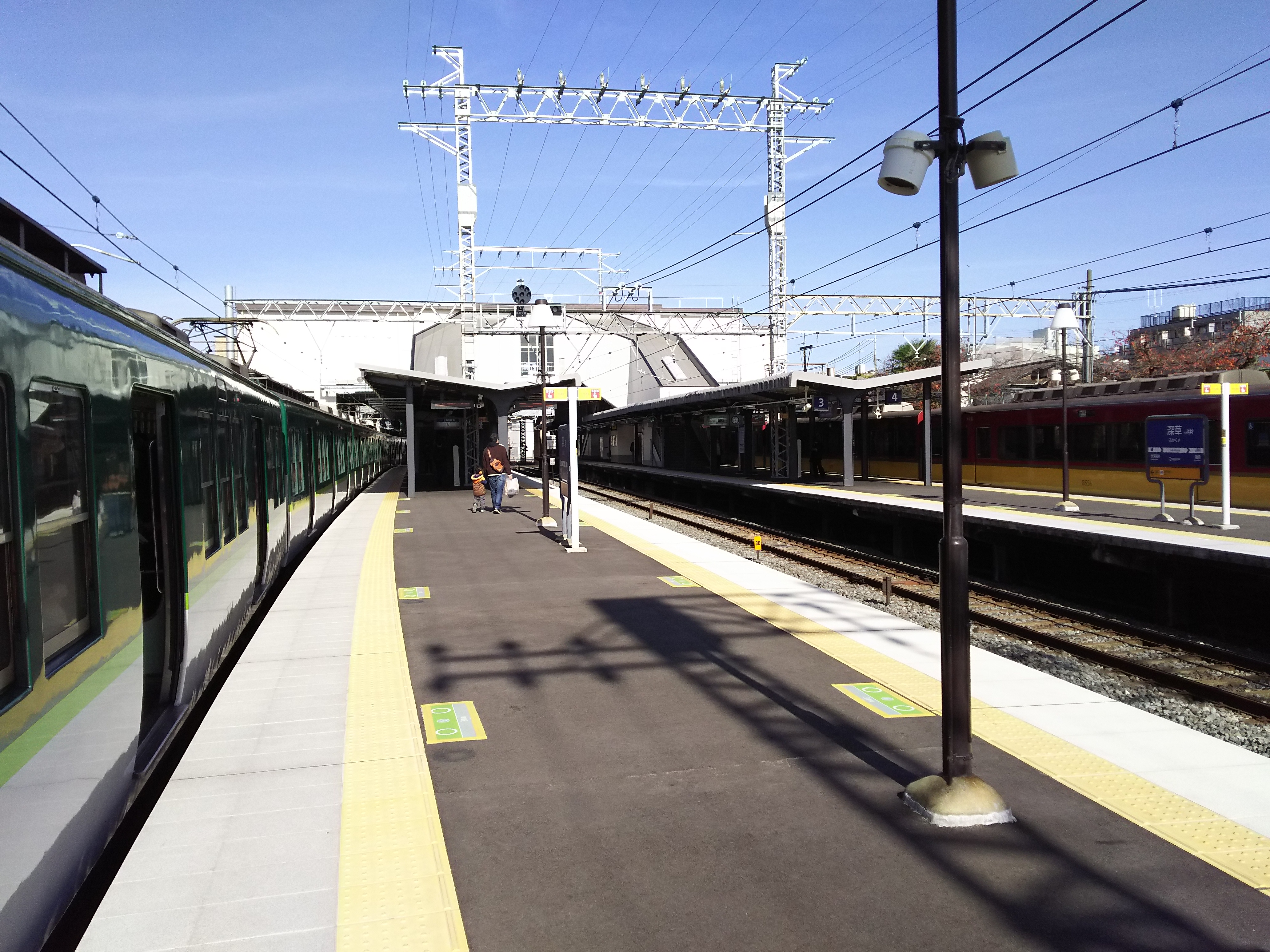 京阪本線深草駅プラットホーム（京都市伏見区）リニューアル工事後に撮影